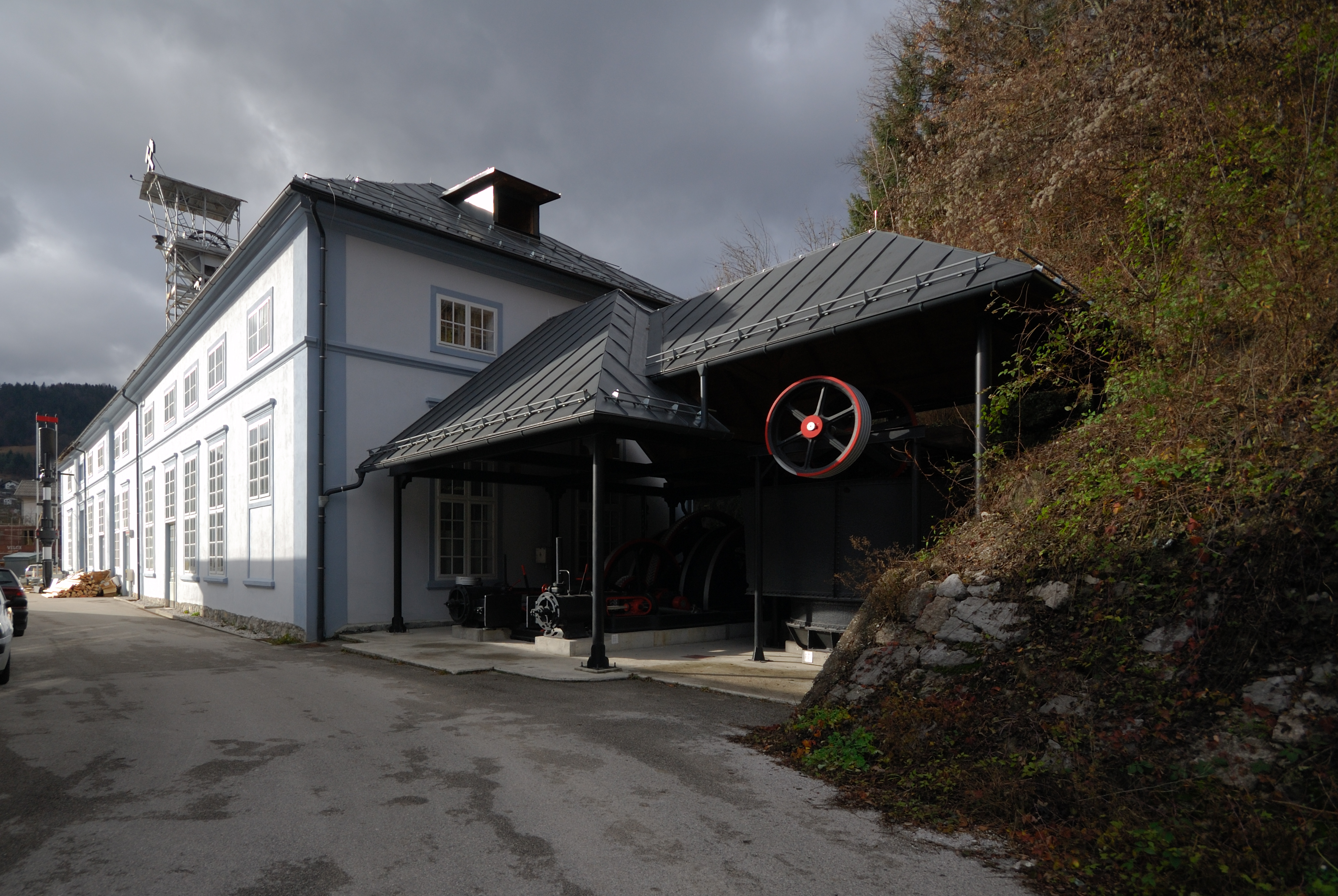 Jašek Frančiške